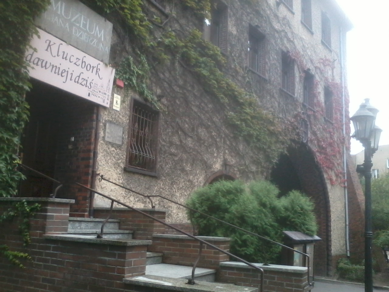 Kluczbork, budynek muzeum, 1931-1932, ul. Zamkowa 10